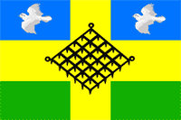 Флаг Газырского сельского поселения, Краснодарский край, Россия.